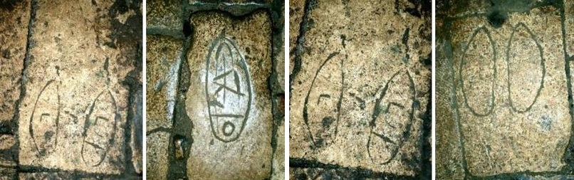 I pellegrini che visitano i santuari lasciano, di solito, una traccia personalizzata del loro passaggio. Più recentemente una firma o le iniziali incise o disegnate a matita o pennarello. In passato, in un epoca di diffuso analfabetismo, si lasciava un segno personale quale, ad es., il contorno della mano, considerato unico per forma e dimensione. In questo santuario sono numerose le incisioni del profilo delle scarpe, anche queste considerate uniche ed irripetibili perchè le scarpe, spesso acquistate per il matrimonio e conservate accuratamente per decenni anche se con qualche rattoppo o risuolatura, erano di produzione artigianale ed eseguite su misura dell'utilizzatore. Pierre Bouet, Giorgio Otranto, André Vauchez ( a cura di:), Culto e santuari di san Michele nell'Europa medievale, Edipuglia, 2007 Wikipedia: Cagnano Varano